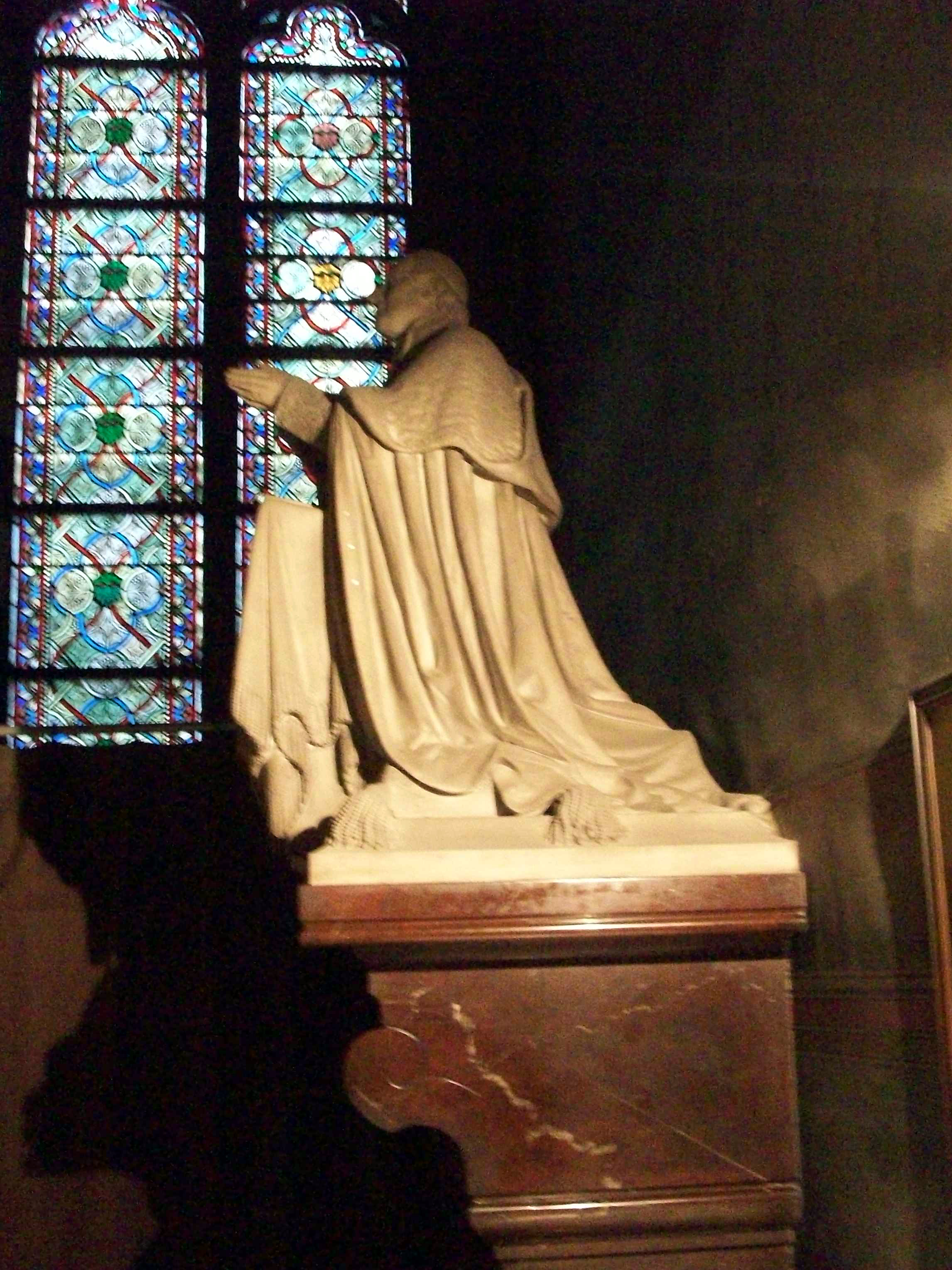 Orant de Marie Dominique Auguste Sibour (1792-1857), évêque de Digne puis archevêque de Paris, dans la chapelle Sainte-Madeleine.